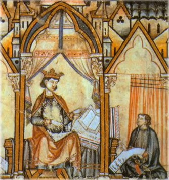 Alfonso X